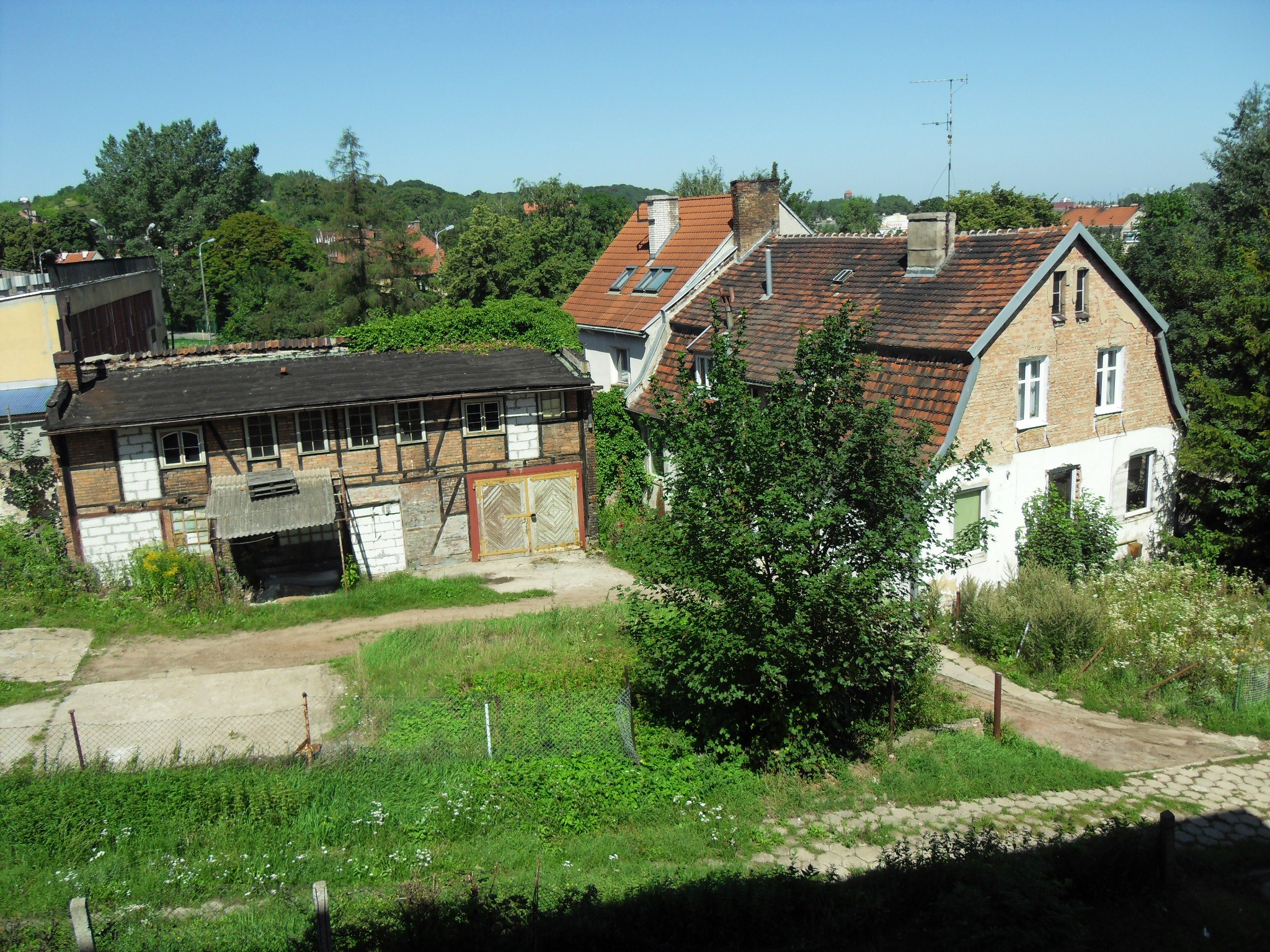 Gdańsk Orunia, zaplecze ulicy Raduńskiej.